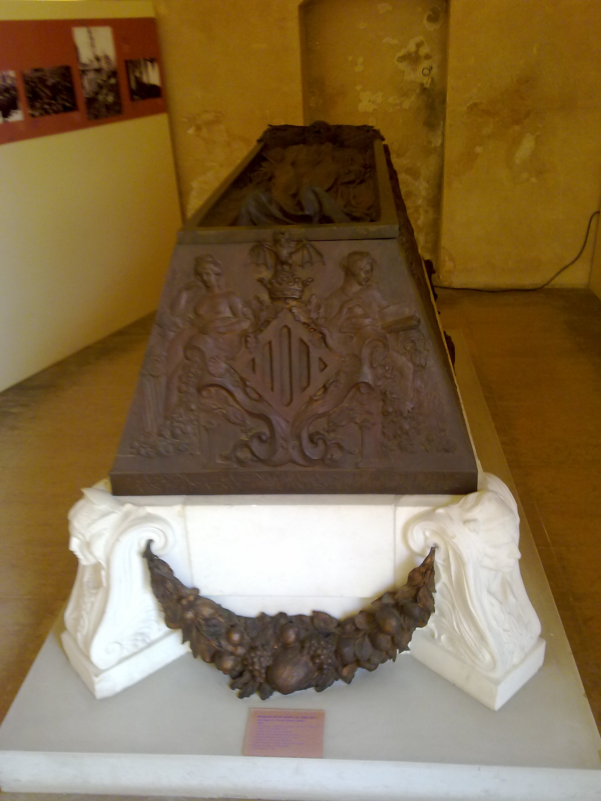 Tumba de Blasco Ibáñez en el Centre del Carme.